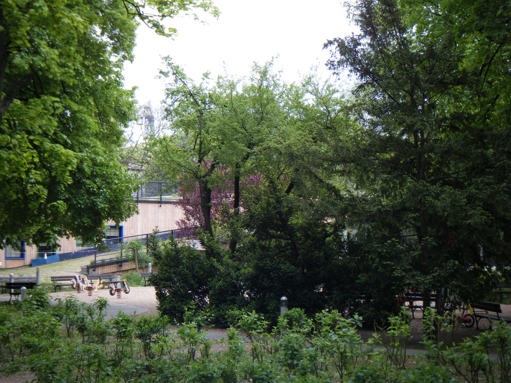 Ognisko Pracy Pozaszkolnej nr 2 im. dra Henryka Jordana przy ul. Alfreda Nobla 18/26 w Warszawie.